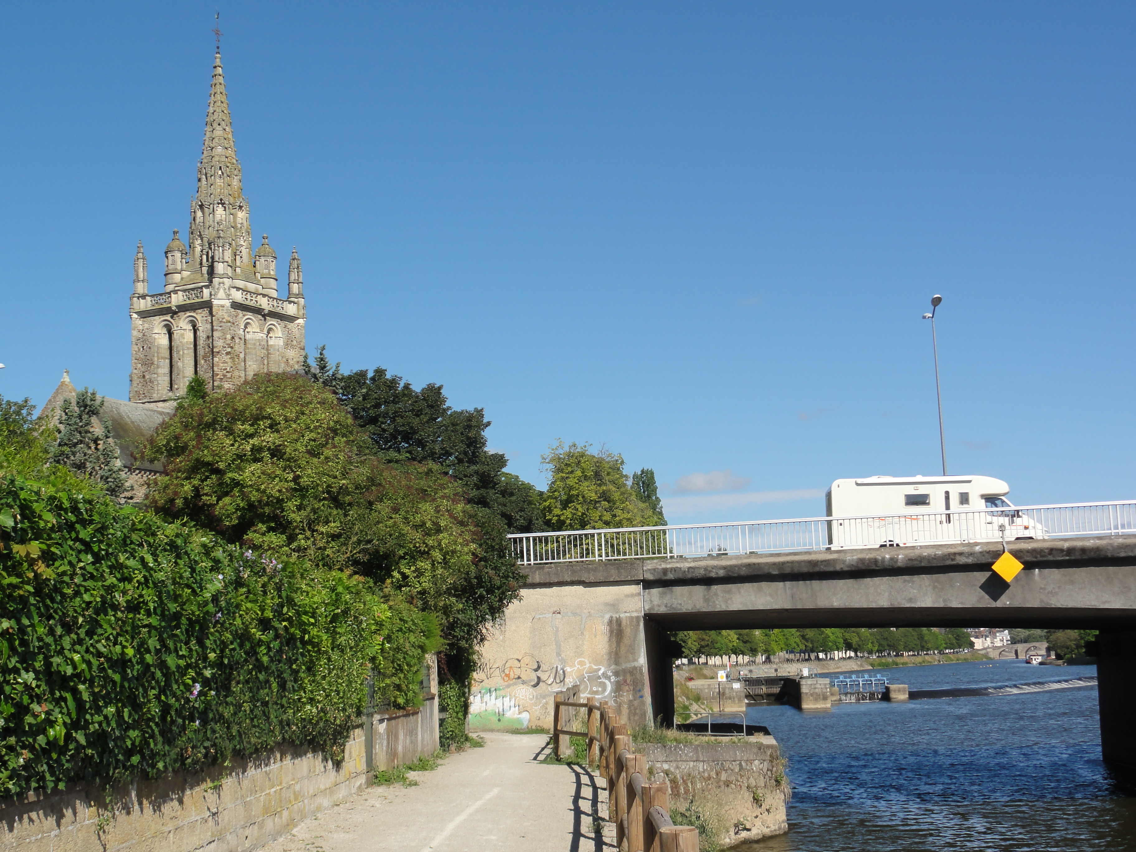 Basilique et pont d'Avesnières, Laval, Mayenne, France.